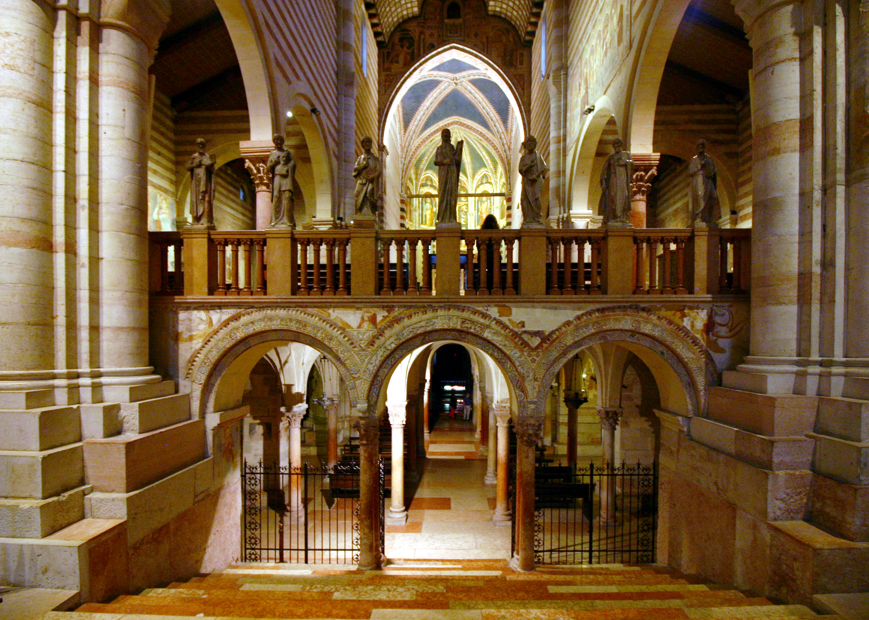 San Zeno - Verona